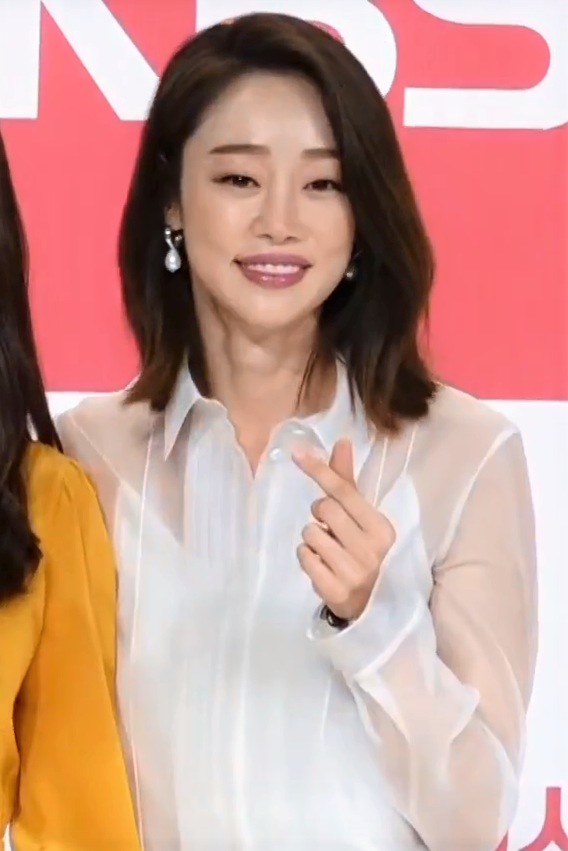 180809 KBS 2TV 새 월화드라마 '러블리 호러블리' 제작발표회